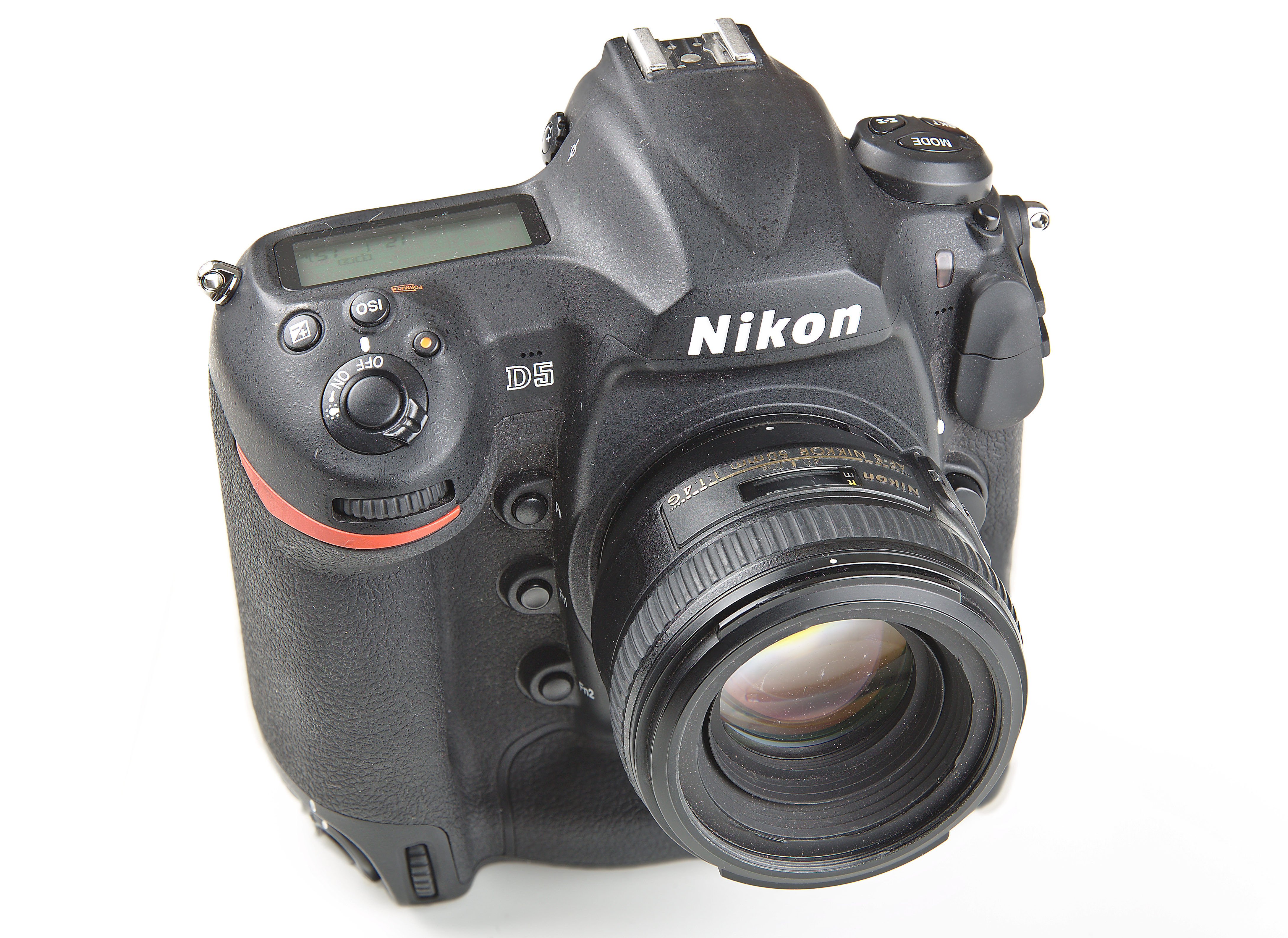 Nikon D5 mit Nikkor AF-S 50mm f/1.4